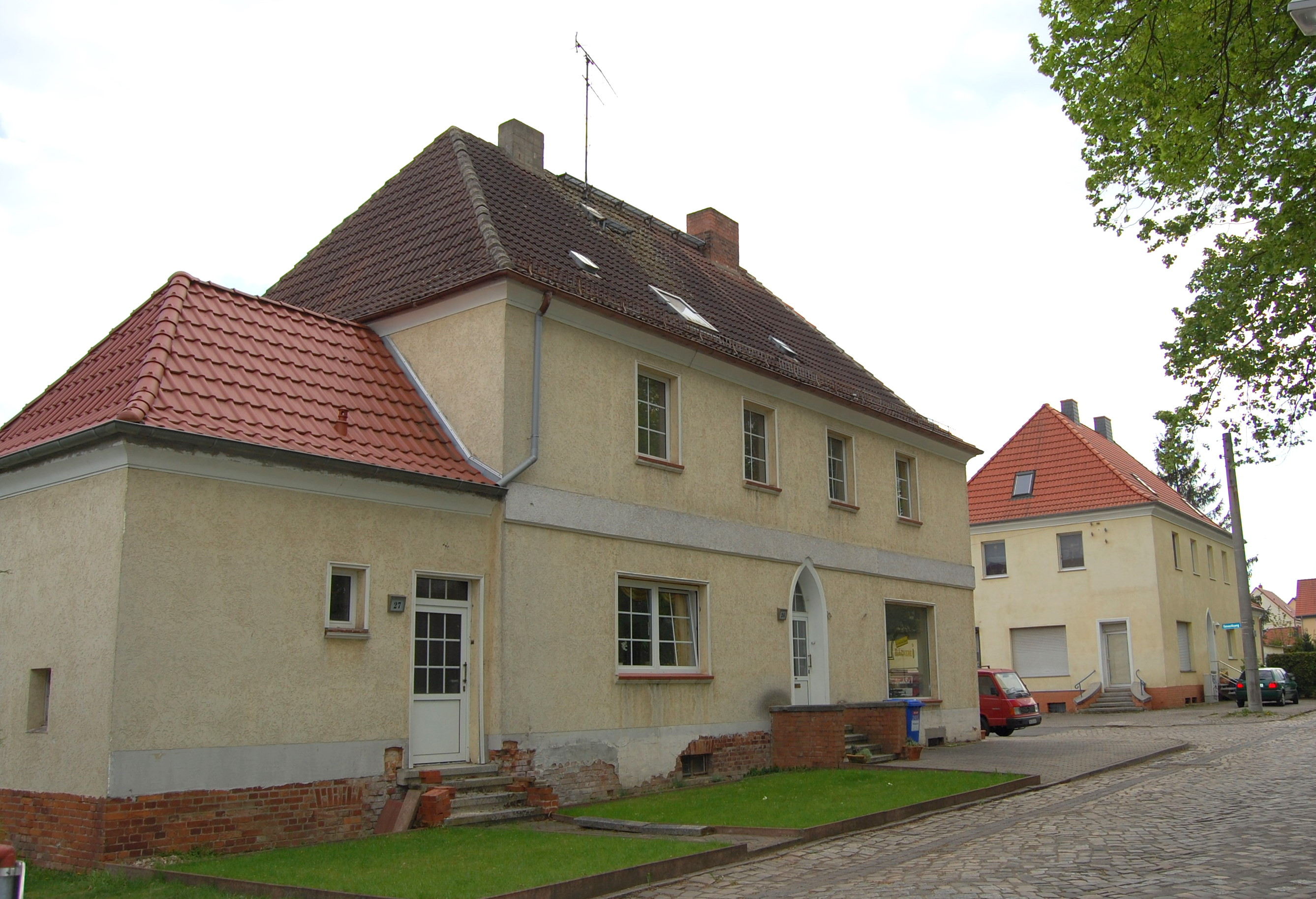 Gebäude für Bäckerei und Verkaufsstelle in Lüttgen-Salbke; Beyendorfer Straße/Ecke Damaschkeweg